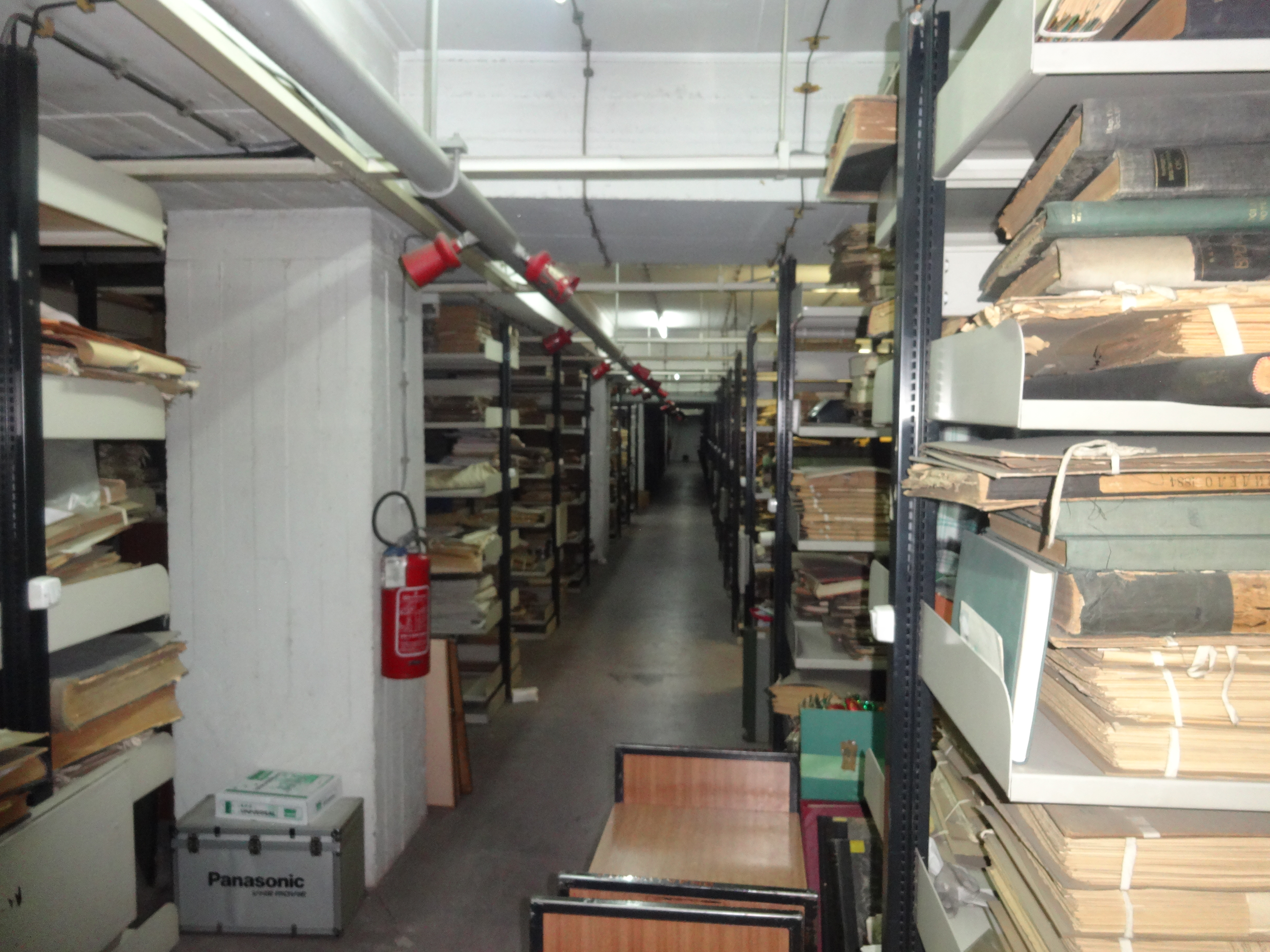 This media file is allowed by the National Library of Serbia.